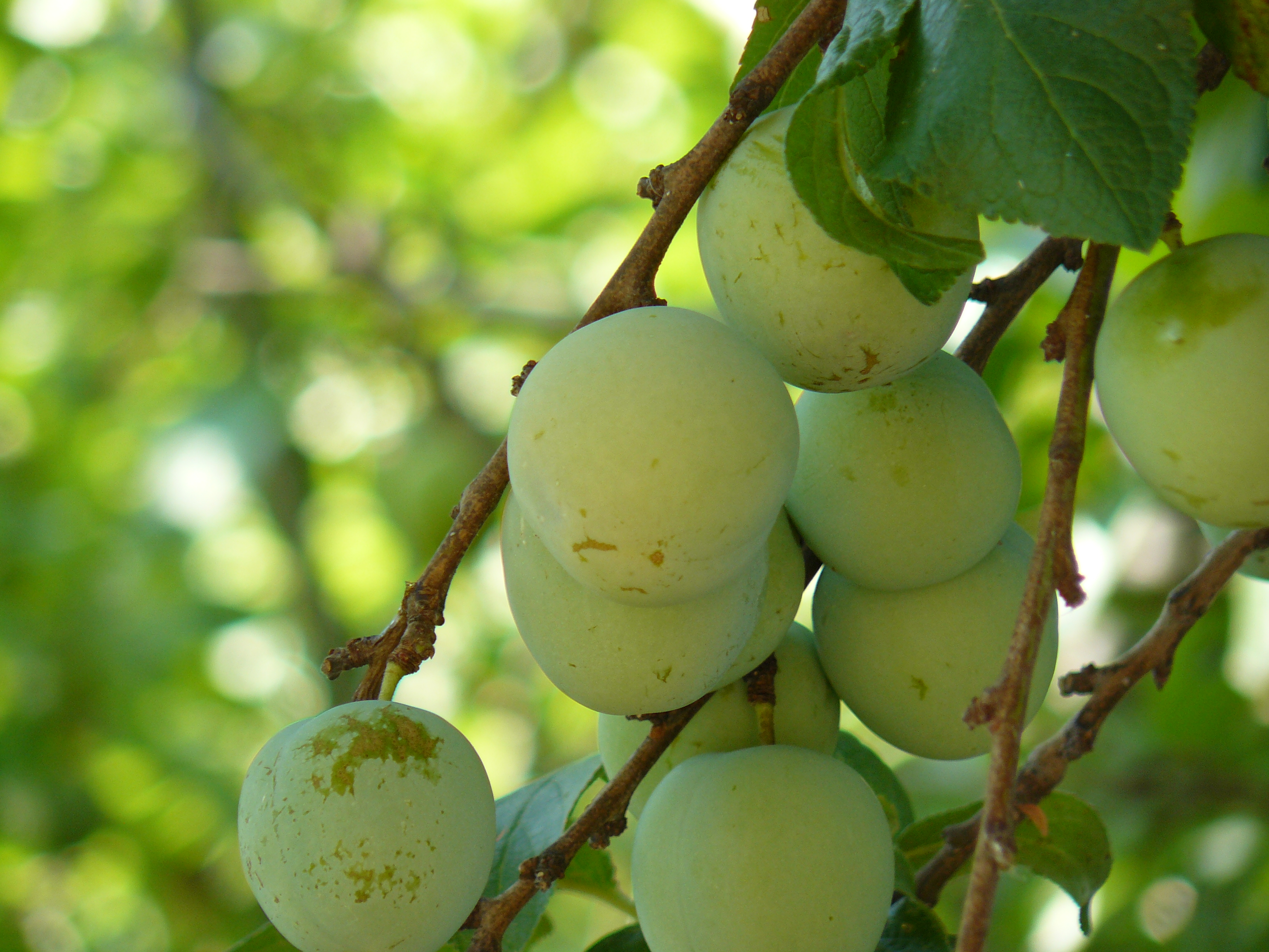 Ciruela el Torregalindo, Burgos.